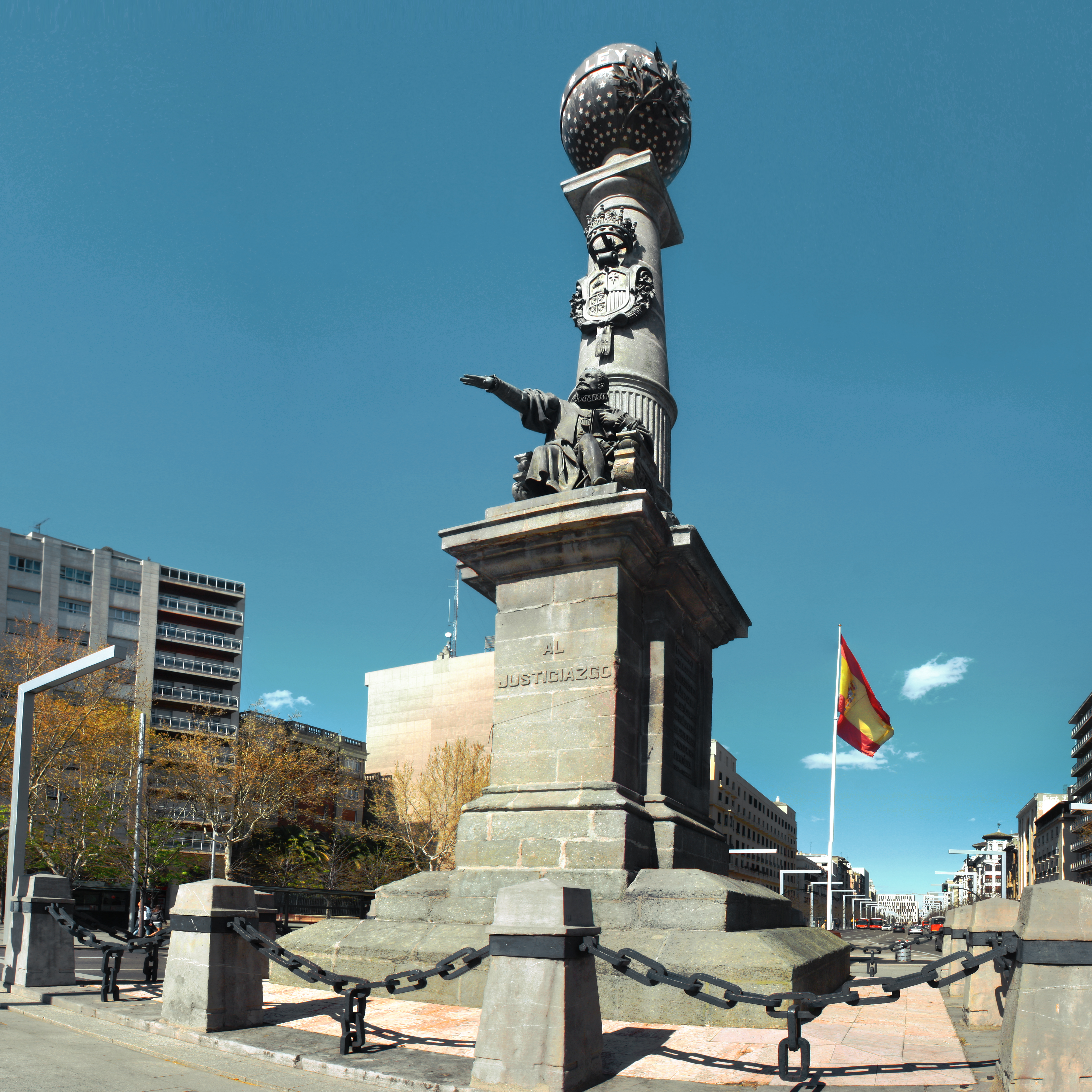 Monument to Justice +info Plaza de Aragón, Zaragoza, España Big On Black